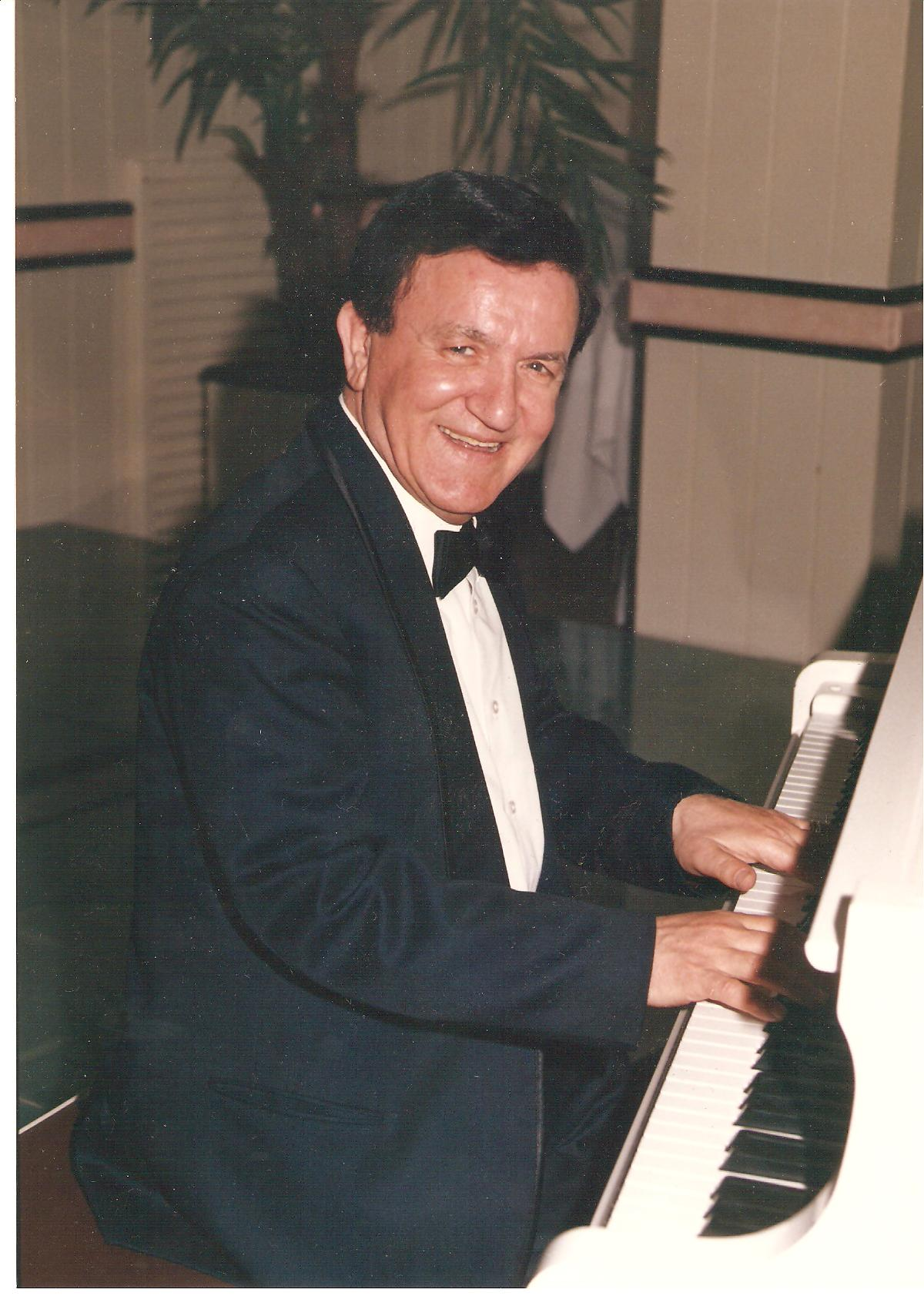 Rico Garofalo al piano